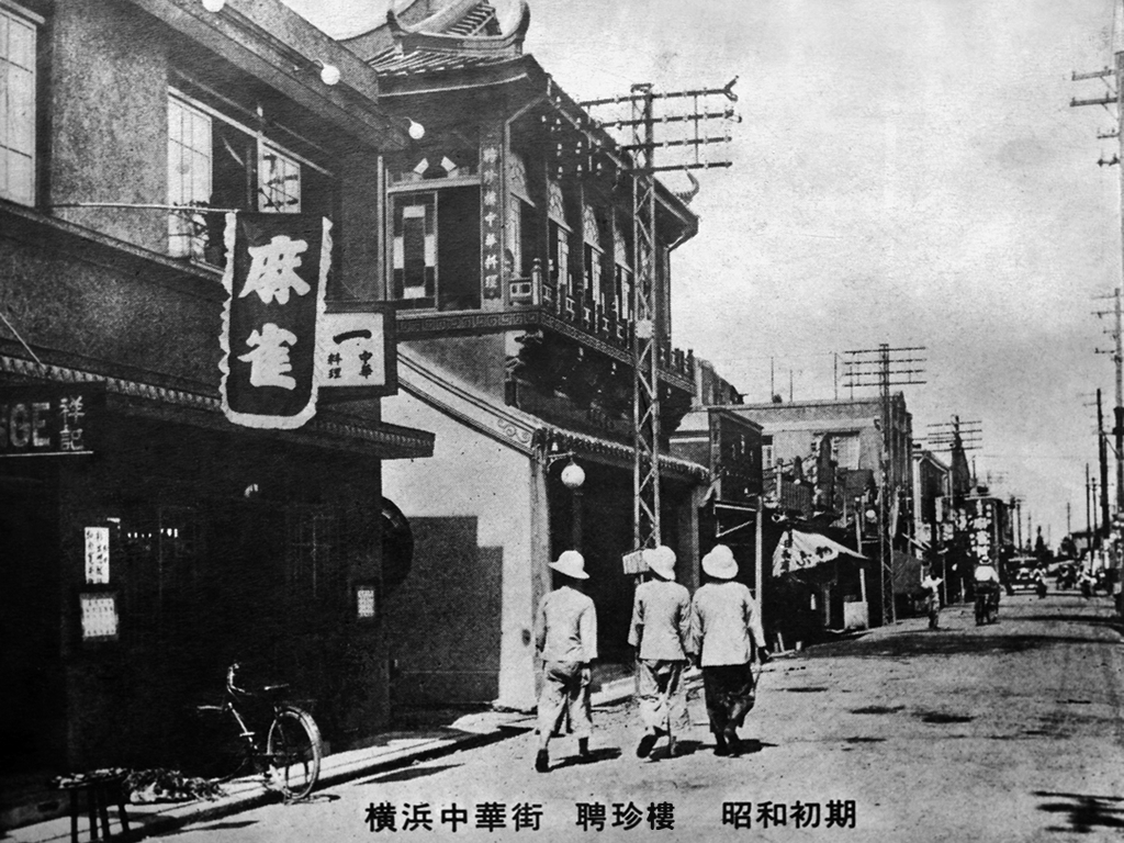 株式会社聘珍樓